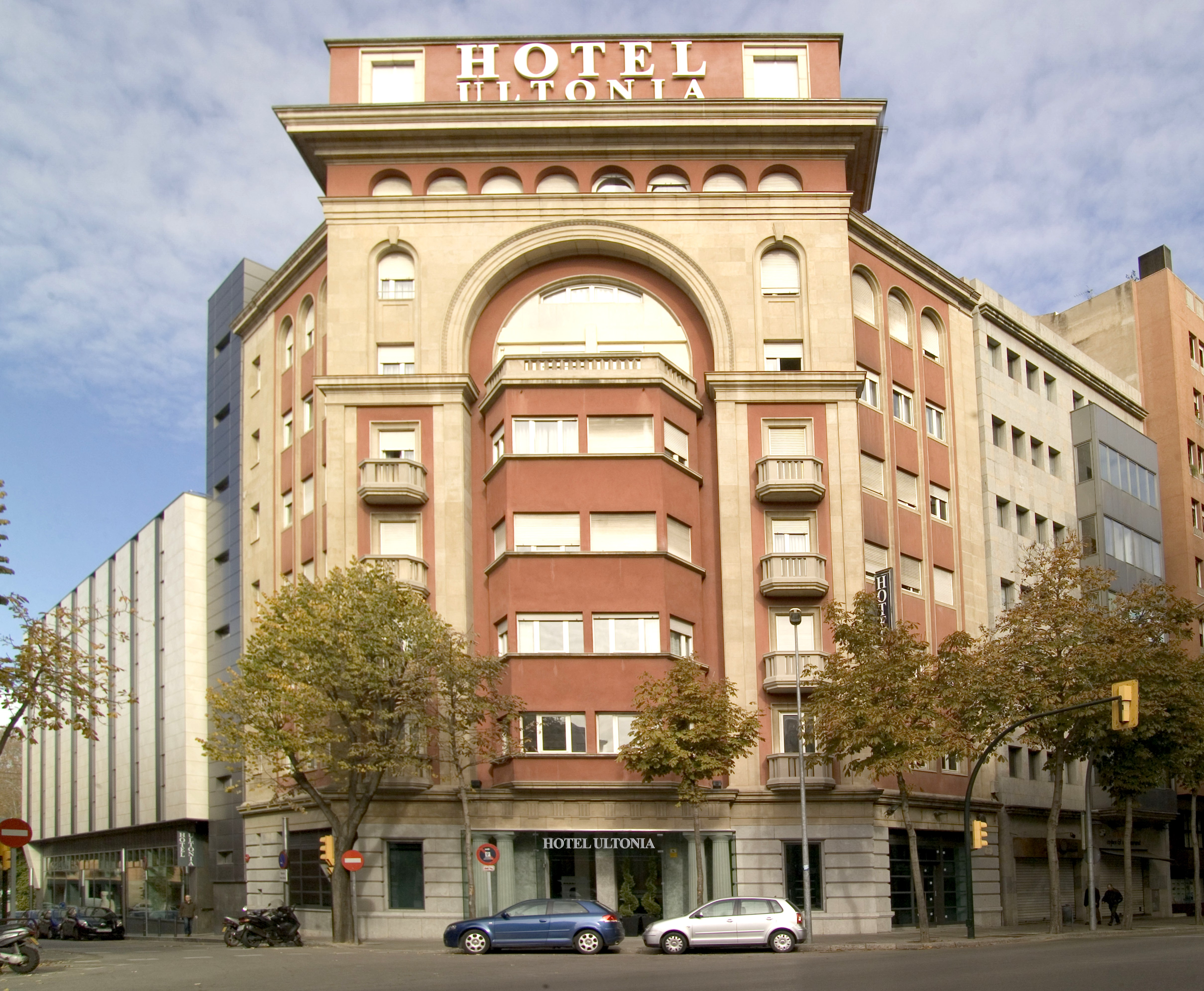 Façana de l'Hotel Ultonia de Girona.